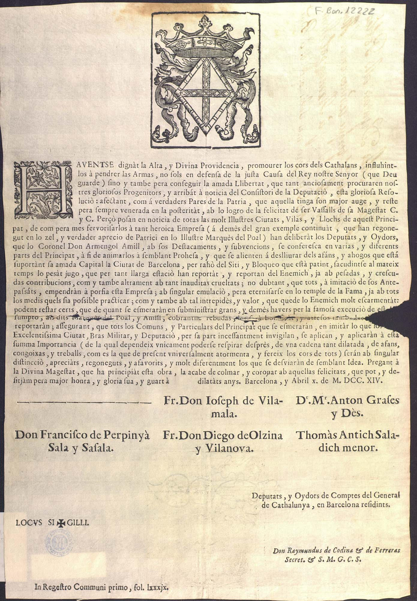 Carta circular dels diputats de la Generalitat de Catalunya del 10 d'abril de 1714